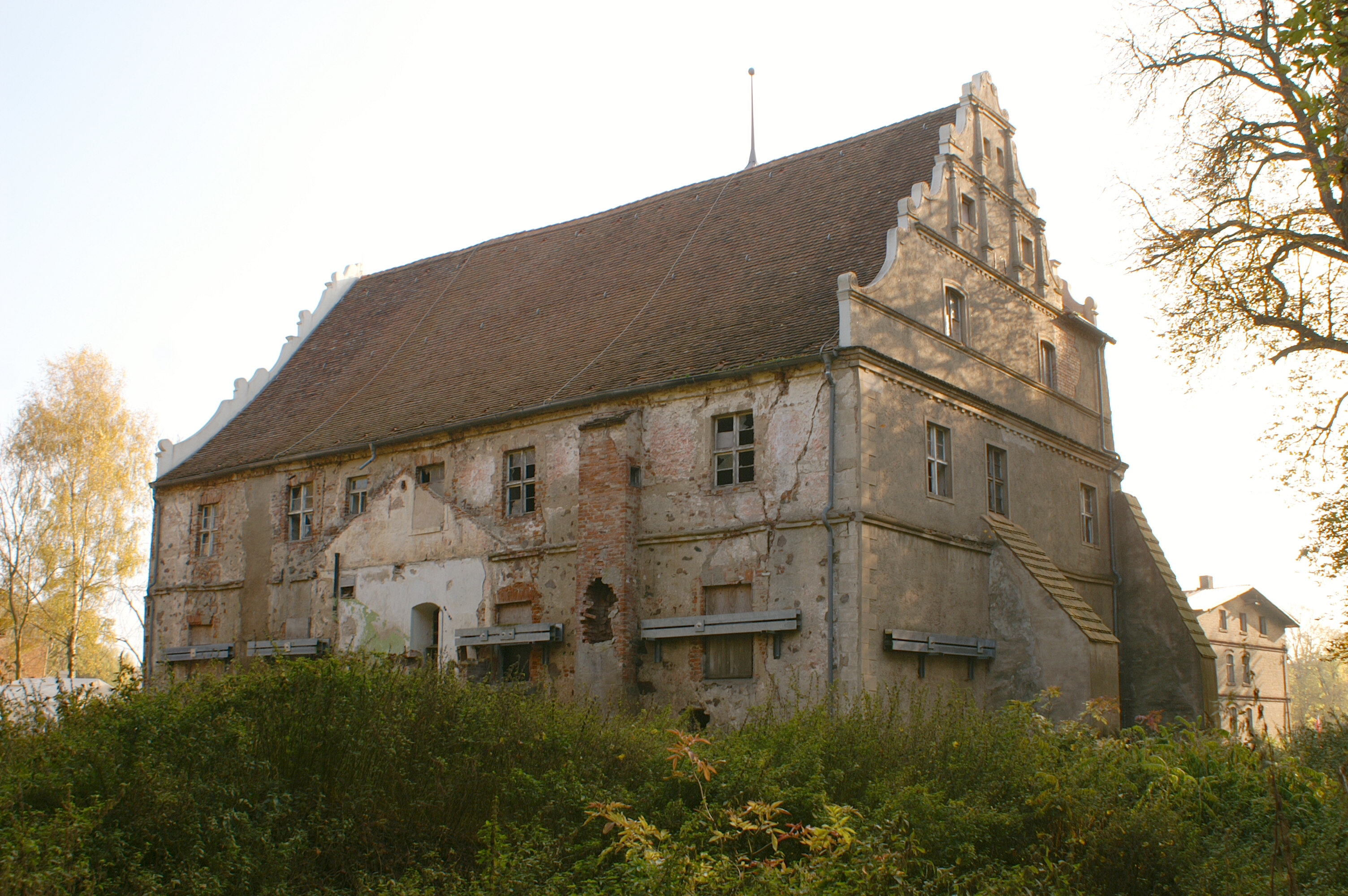 Wasserschloss Quilow, Landkreis Ostvorpommern, Nordseite und Ostgiebel